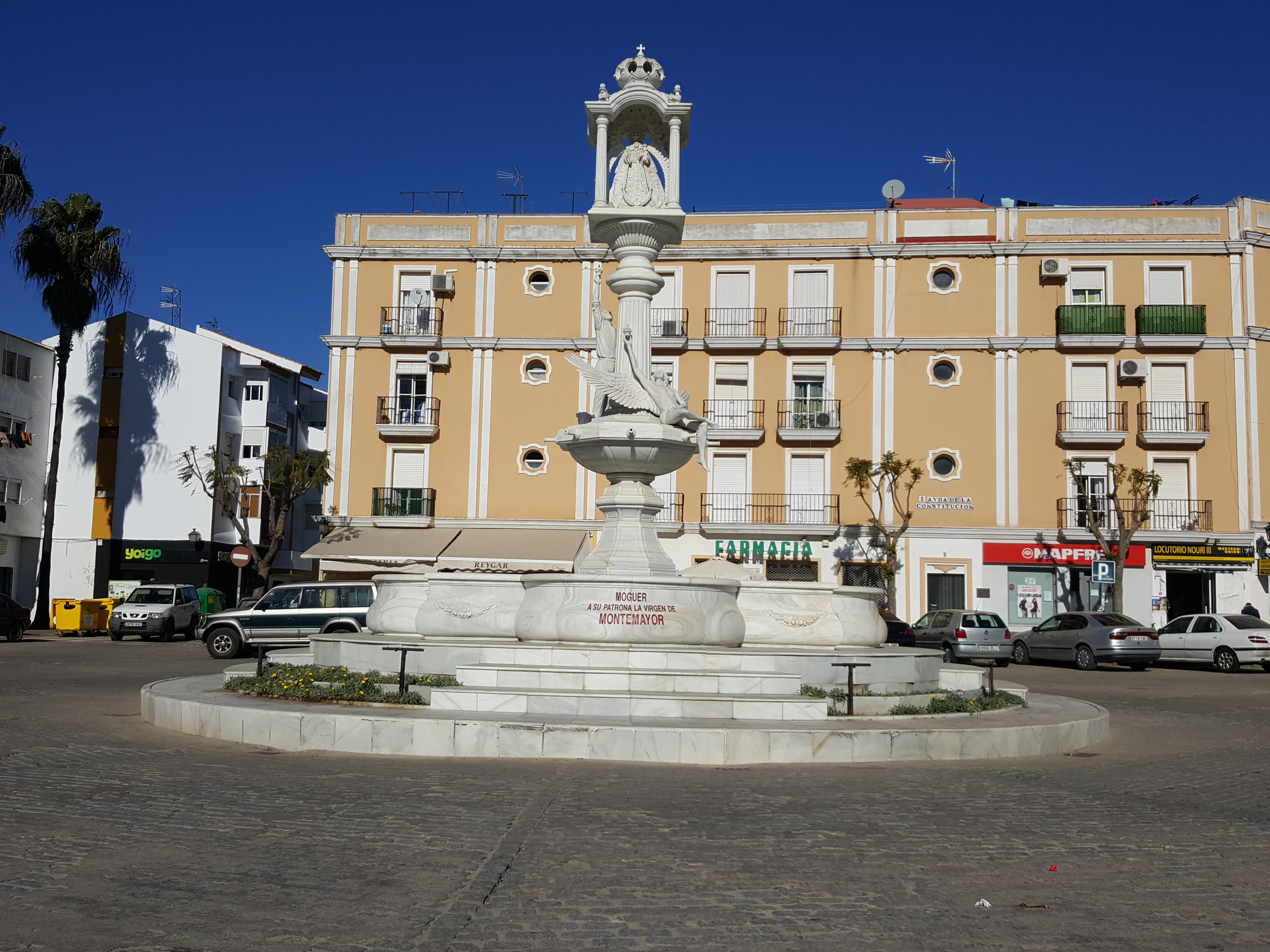 Monumento a la coronación de la Virgen de Montemayor en Moguer Andalucía (España).